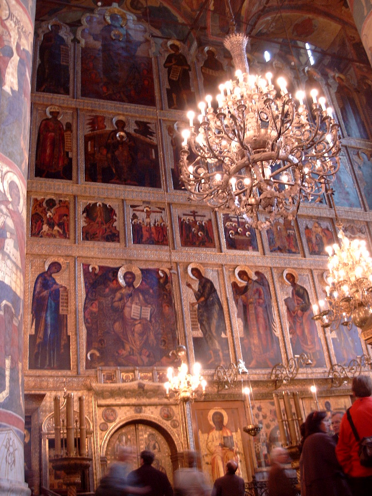 Wand einer Kreml-Kirche voller Ikonen